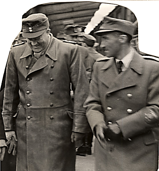 Ukjent datering Fotograf: Kriegsberichter Komp. RA/PA-1193/V/0001 1087